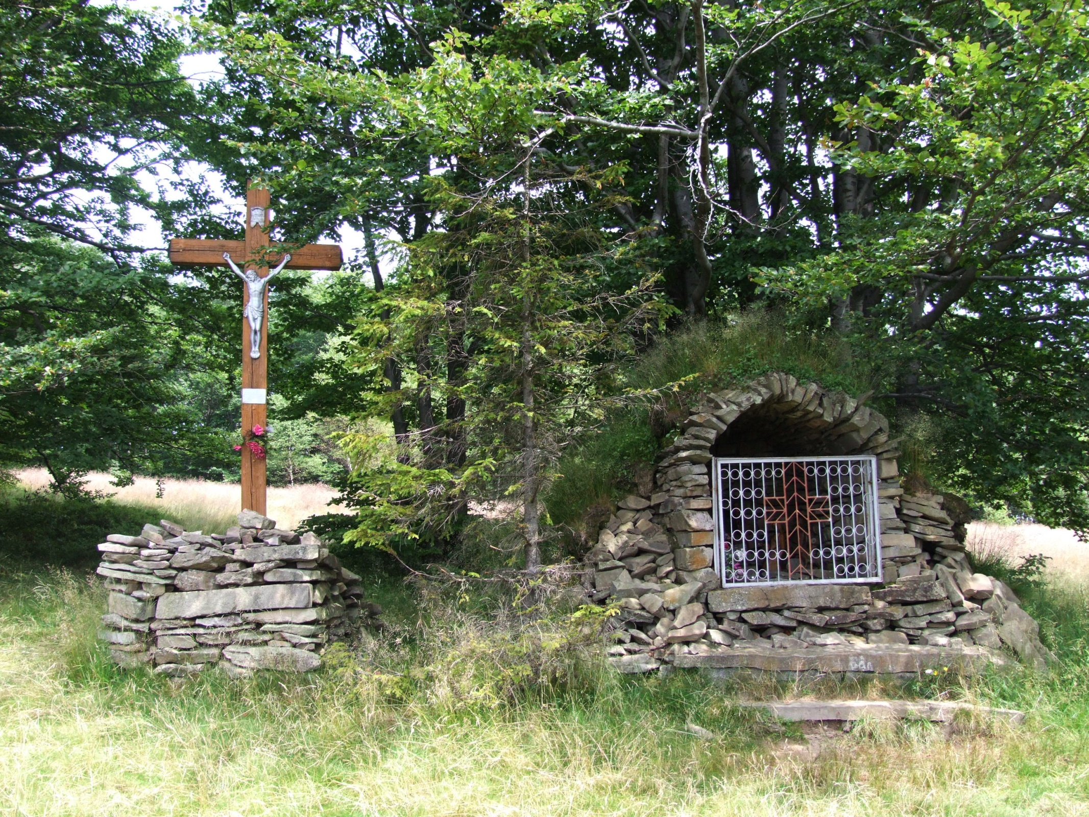 Kamienna kapliczka z szopką betlejemską na Hali Jaworzyna w Beskidzie Sądeckim